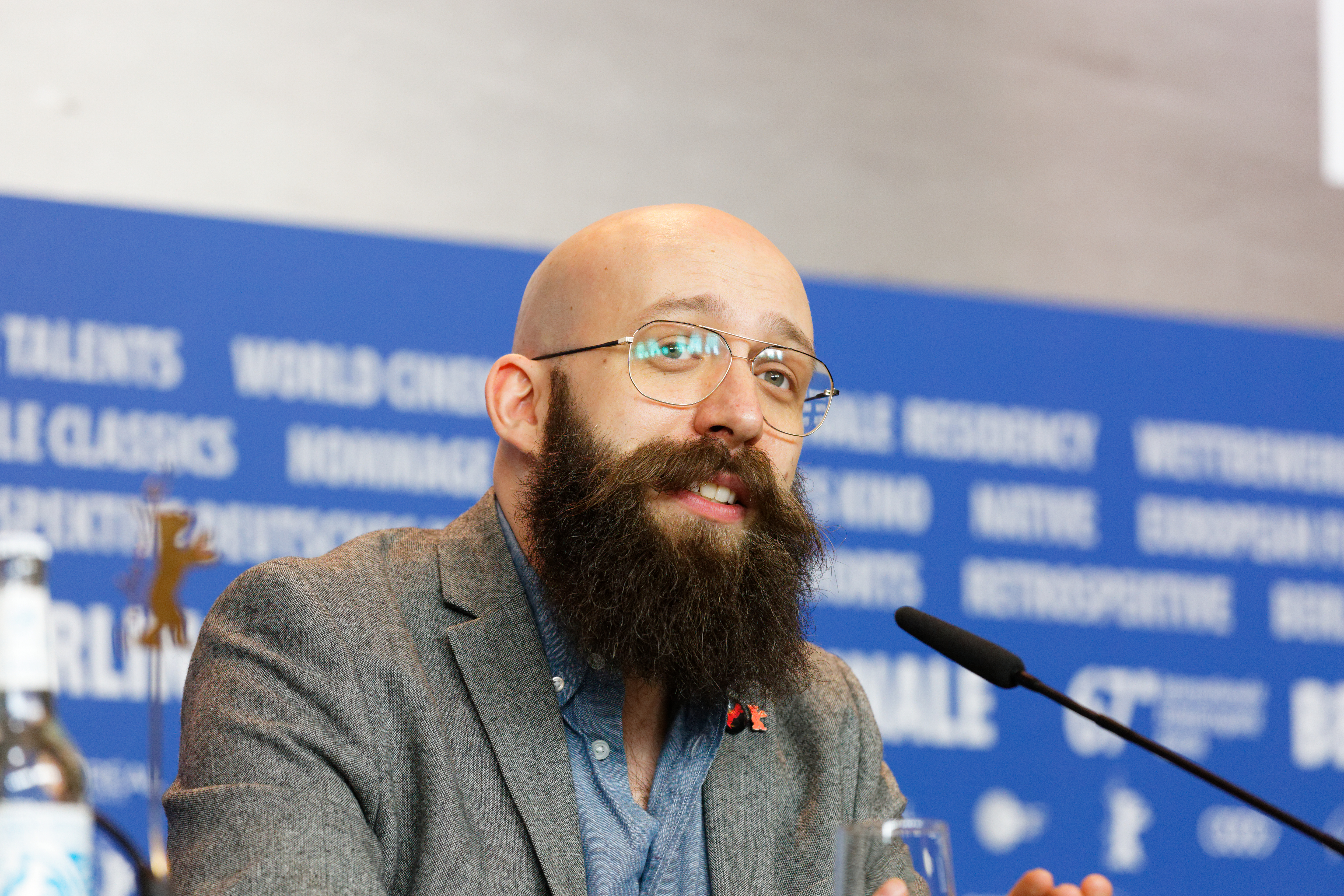 Jakob Lass bei der Pressekonferenz zu Tiger Girl bei der Berlinale 2017